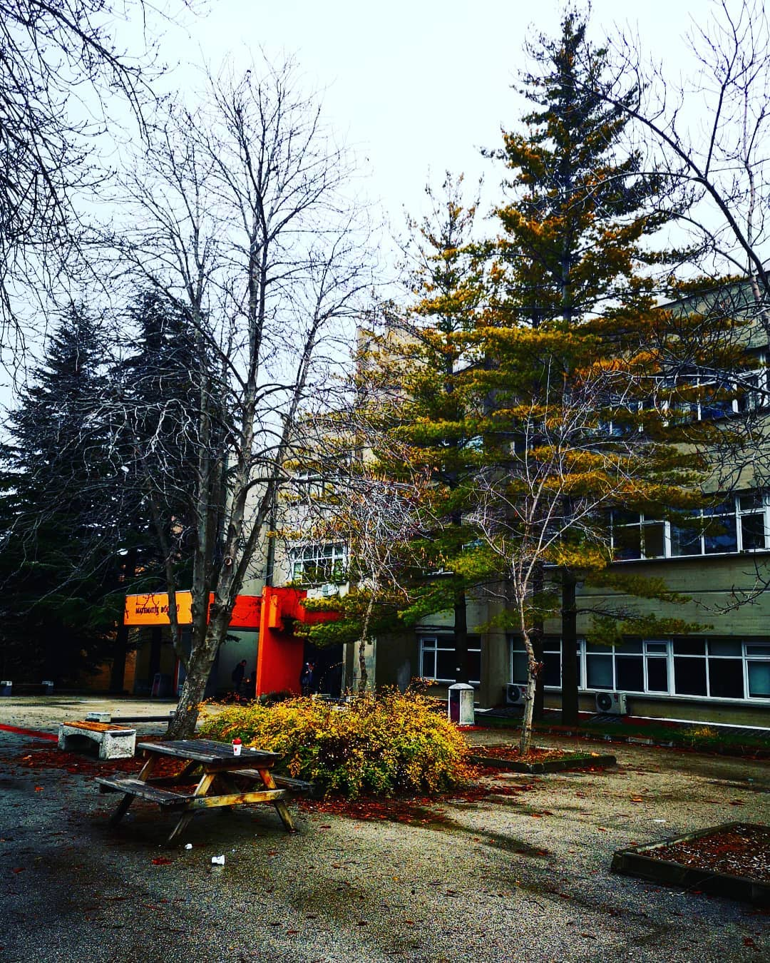 Hacettepe Üniversitesi Beytepe Kampüsü